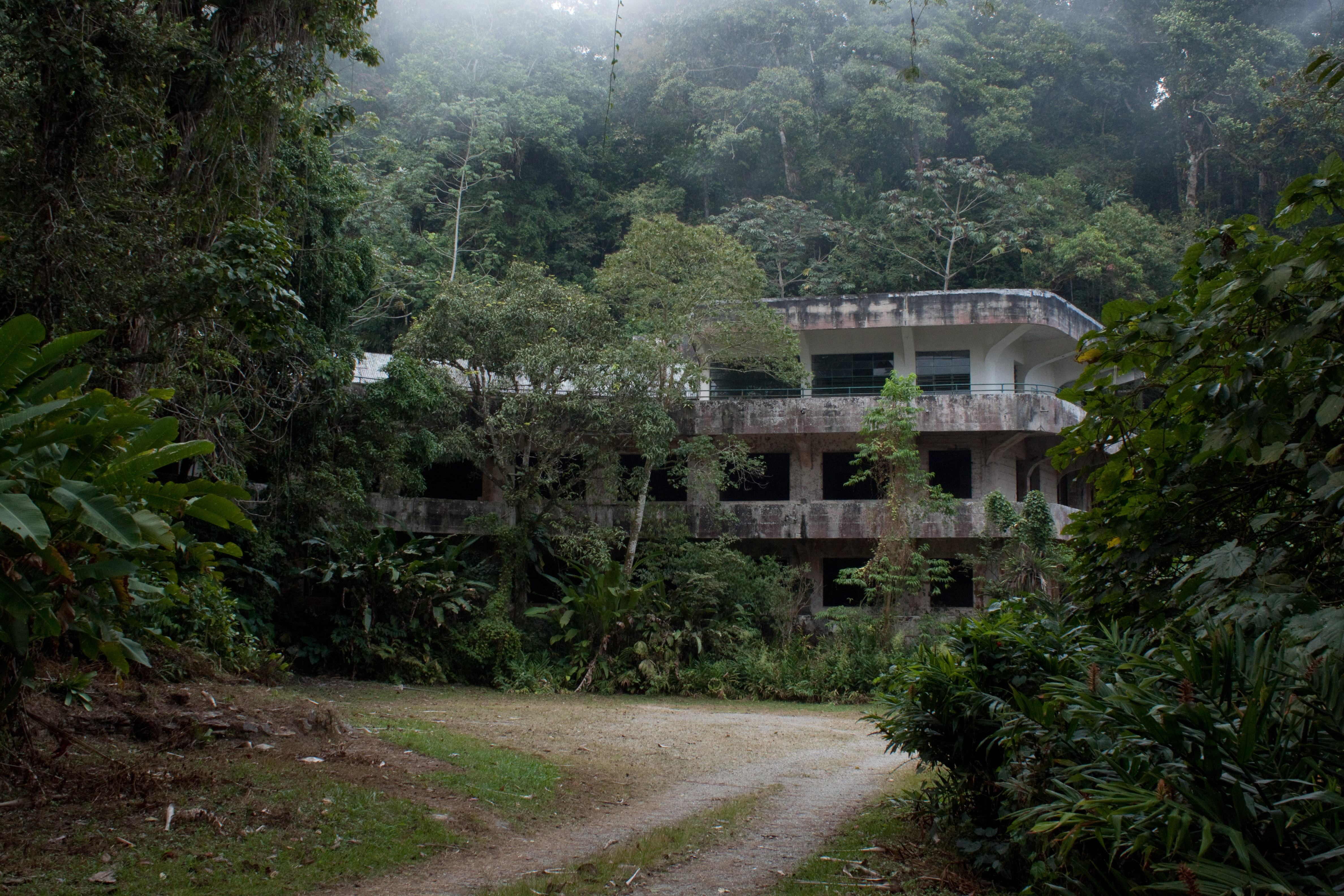 Antiguo hotel que es usado como estación biológica en el Parque Nacional Henri Pittier